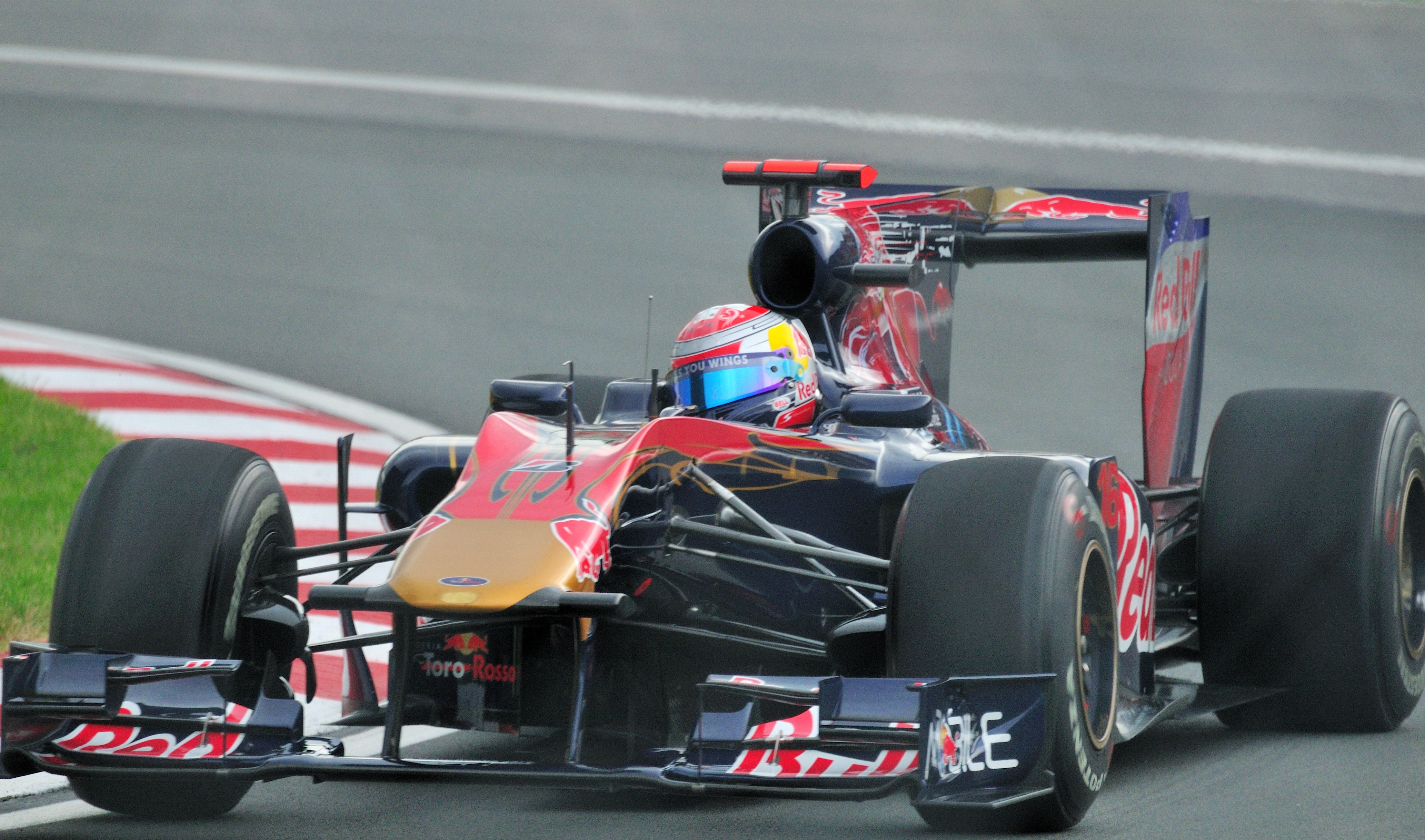 Toro Rosso driver Sebastien Buemi (2010 Montreal GP)